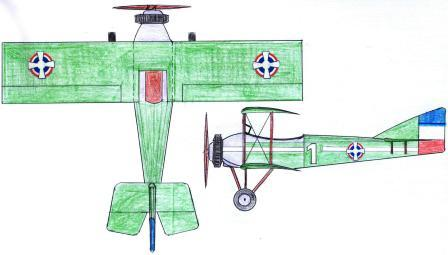 Арно HD-320. Аутор: Д.Ј.Басић